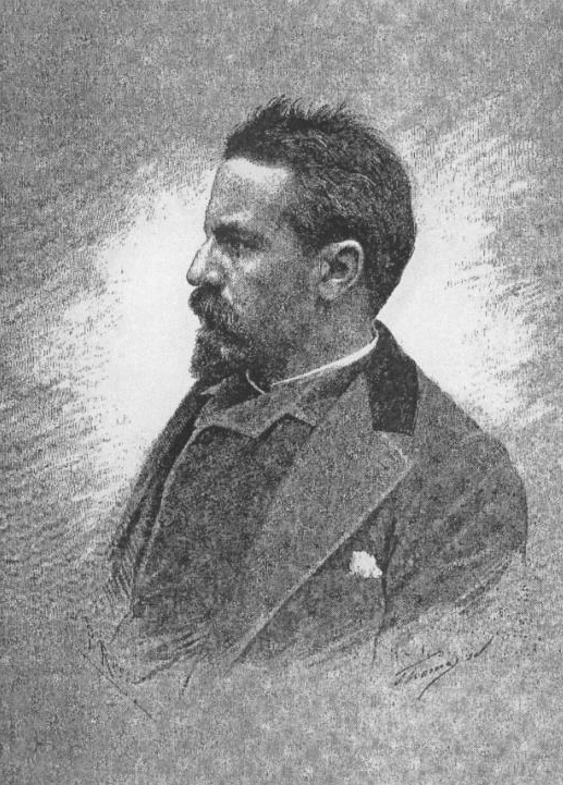 Retrat de Ramon Picó i Campamar